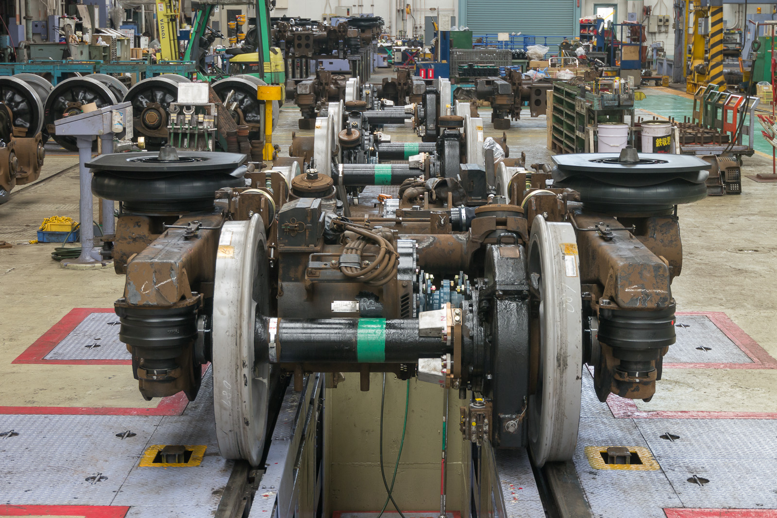 JR東日本205系5000番台のDT70形台車。交流誘導電動機化、TD平行カルダンに改造。